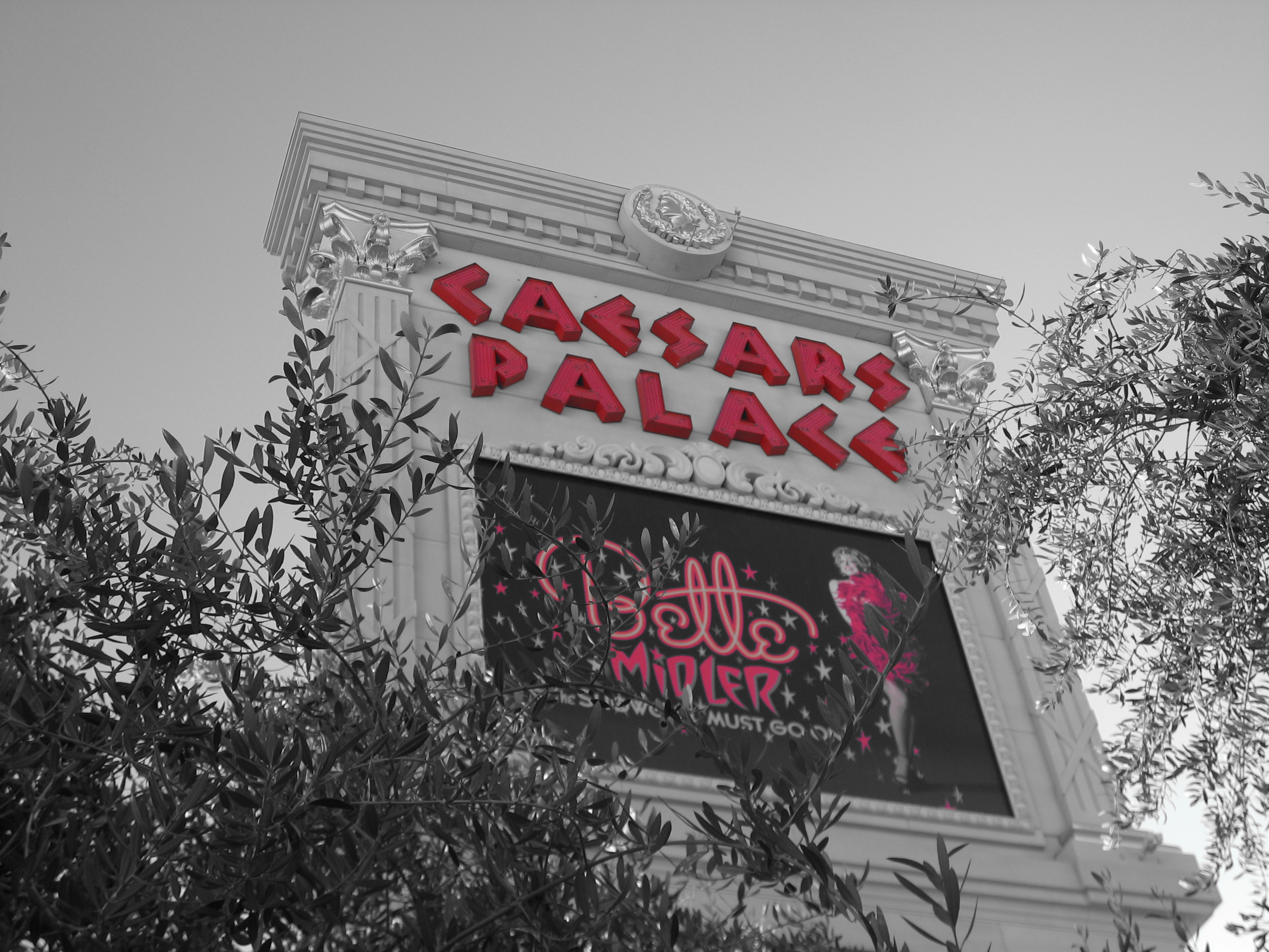 Anuncio del show de Bette Midler en el casino Caesars Palace en Las Vegas.